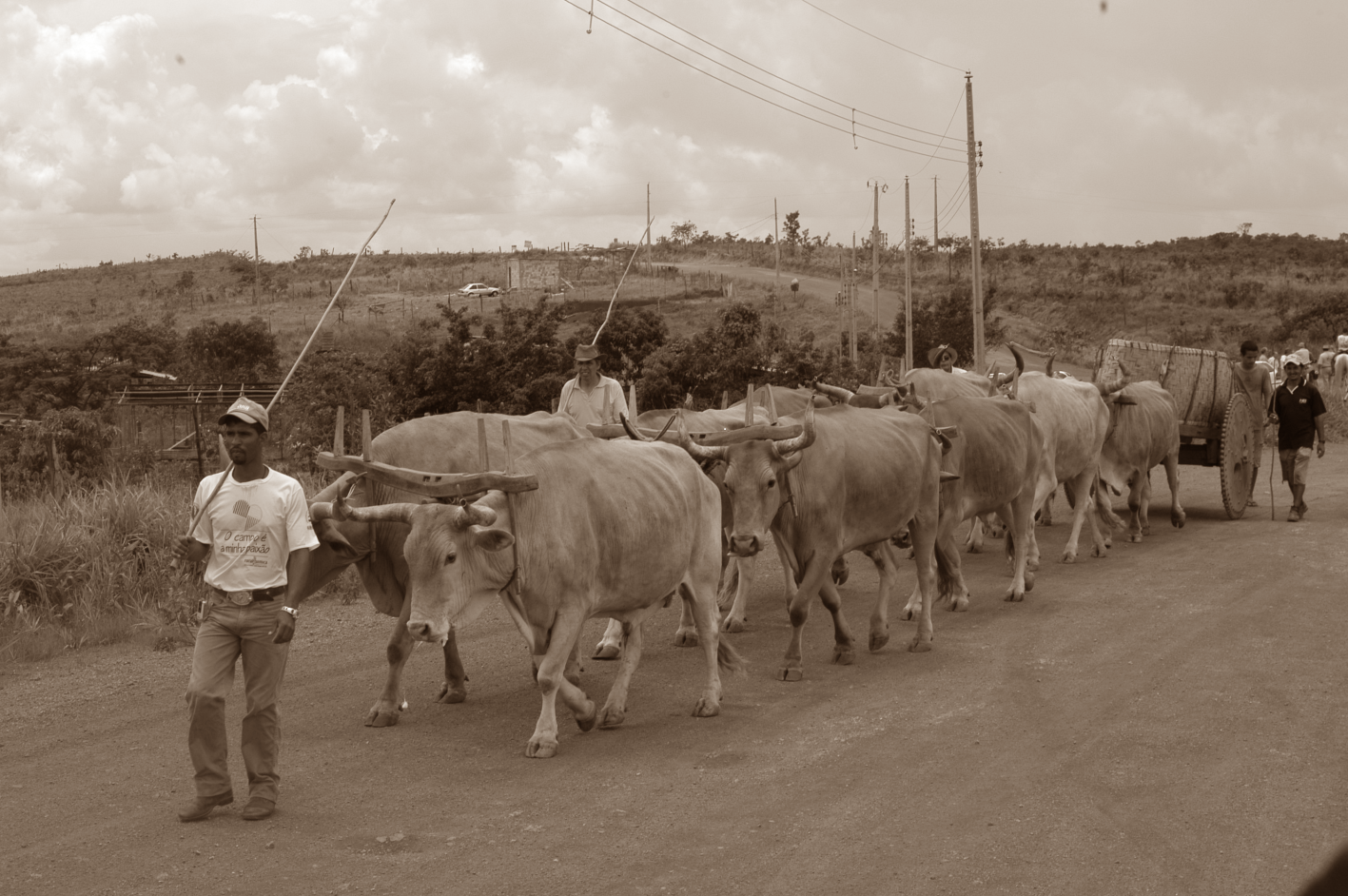 Passeio de carro de boi pela região de Sobradinho dos Melos, núcleo rural pertencente à região administrativa de Paranoá, DF, Brasil